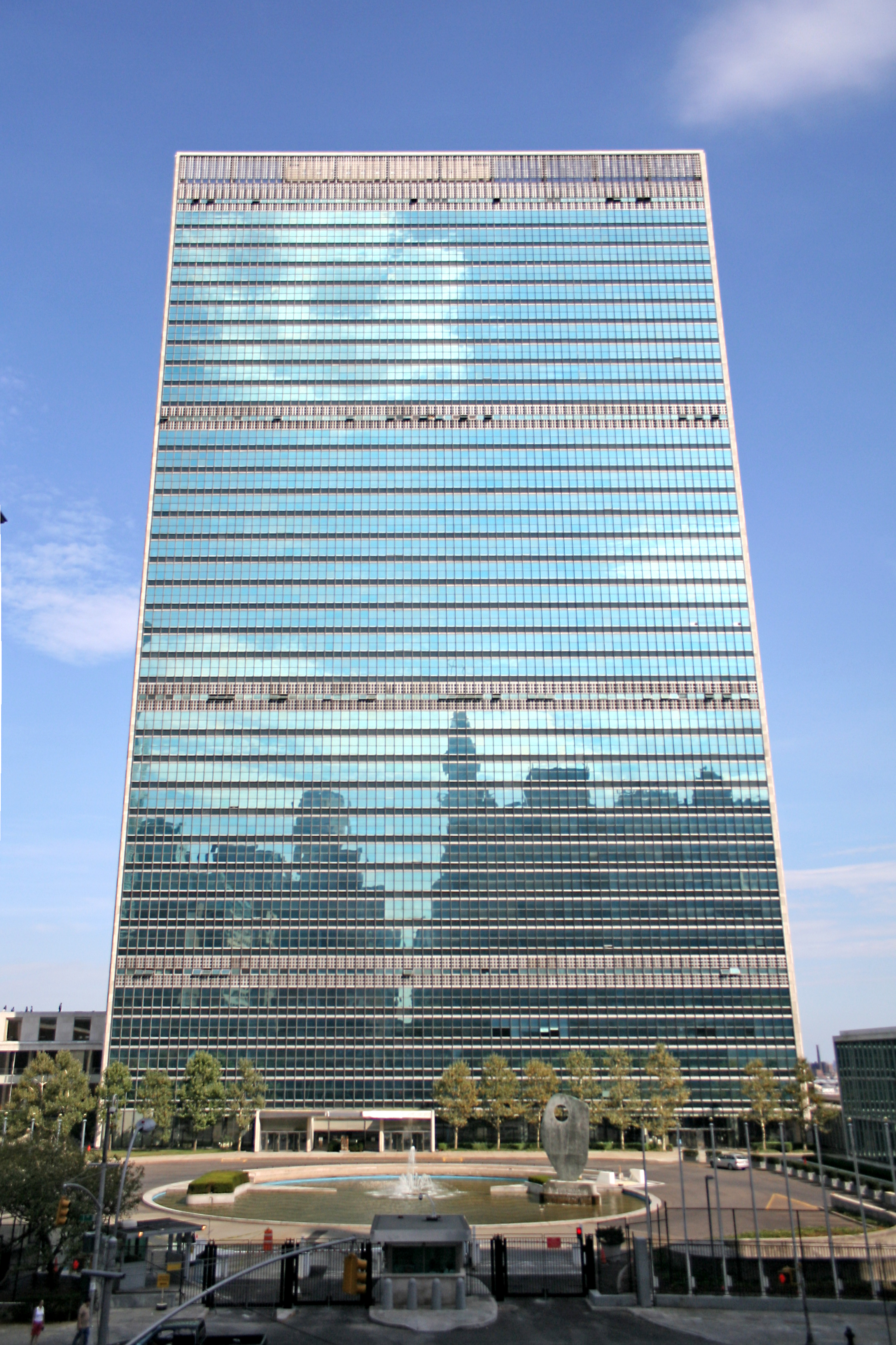 Gebäude der UNO in New York